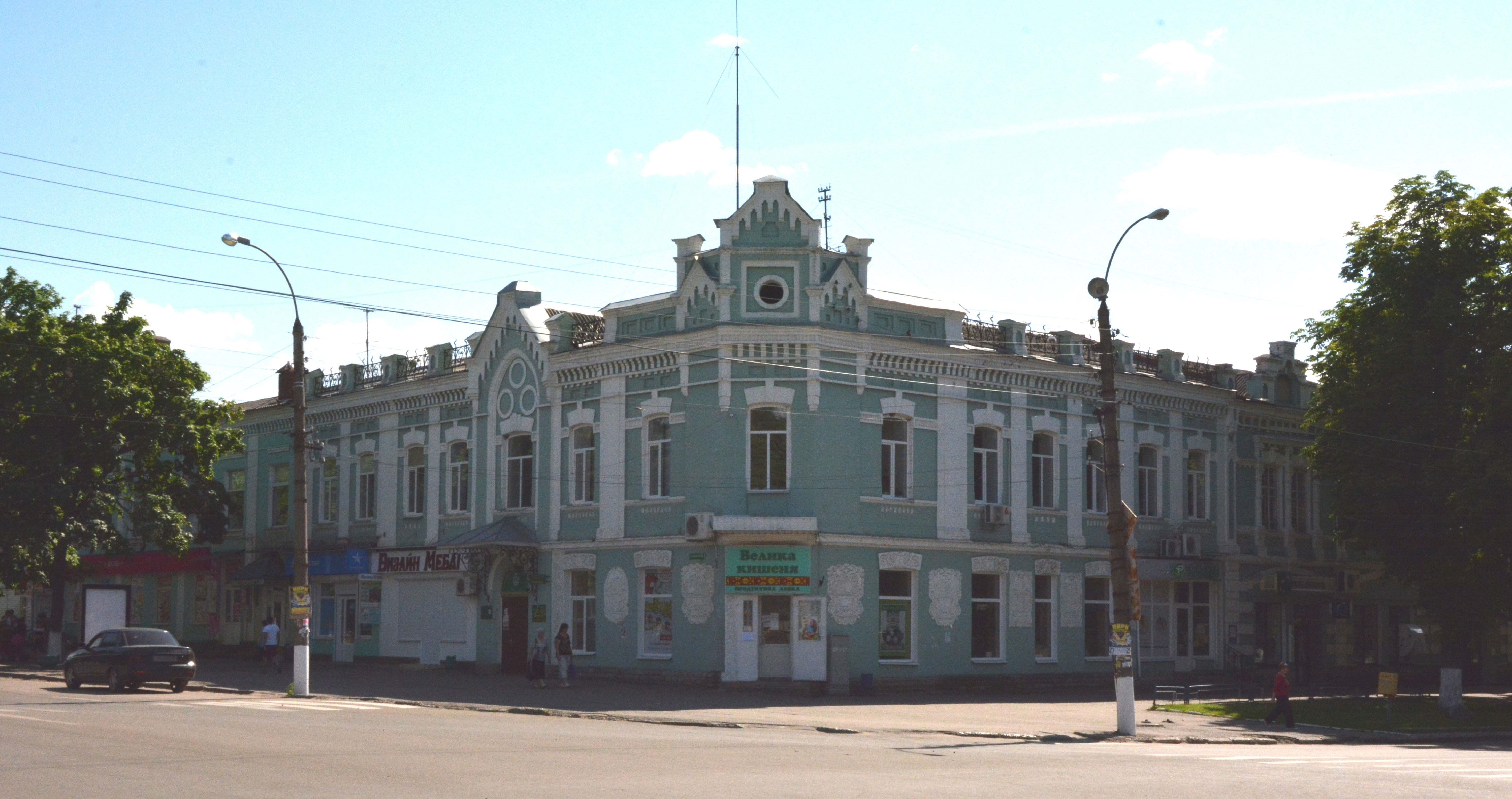 Банк (мур.), Ромни, вул. Соборна, 1